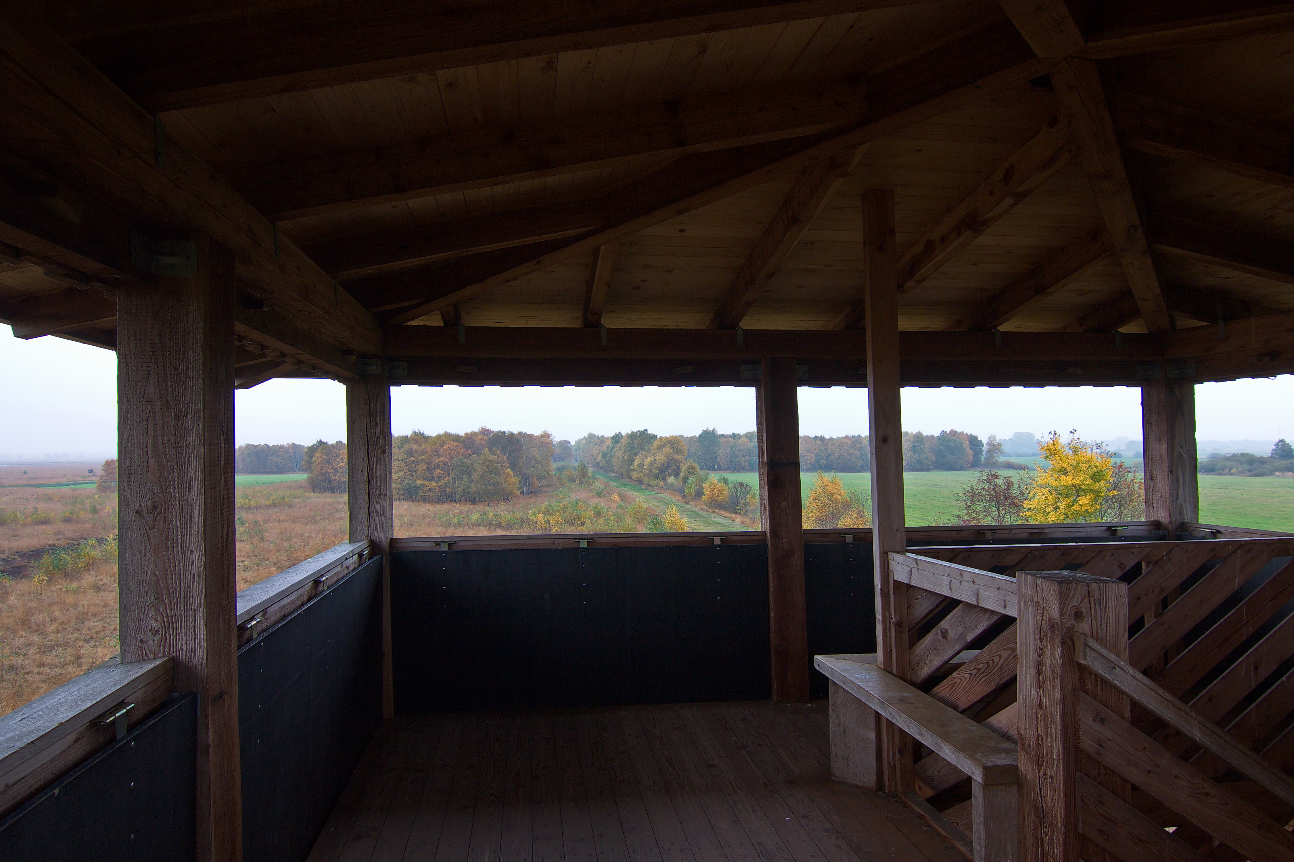 Das Naturschutzgebiet Rehdener Geestmoor ist ein ausgedehntes offenes Hochmoor in der Samtgemeinde Rehden, Landkreis Diepholz, Niedersachsen, Deutschland.